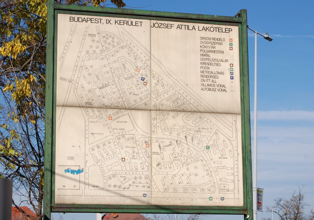 A József Attila lakótelep térképe az Ecseri úti metróállomásnál (Budapest, IX. kerület, Magyarország)